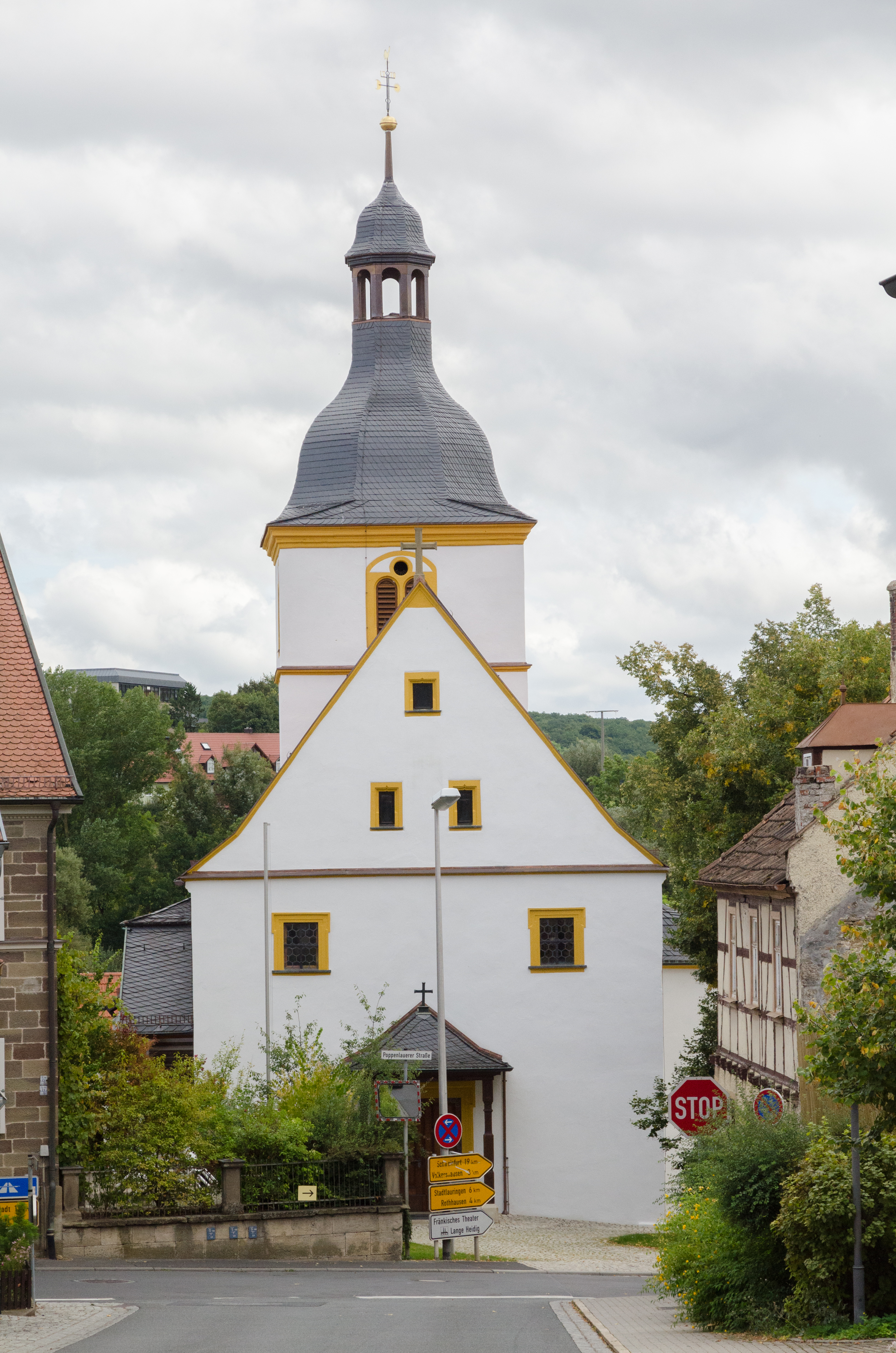 Maßbach, St. Bartholomäus, Sep. 2013 nach der Außenrenovierung